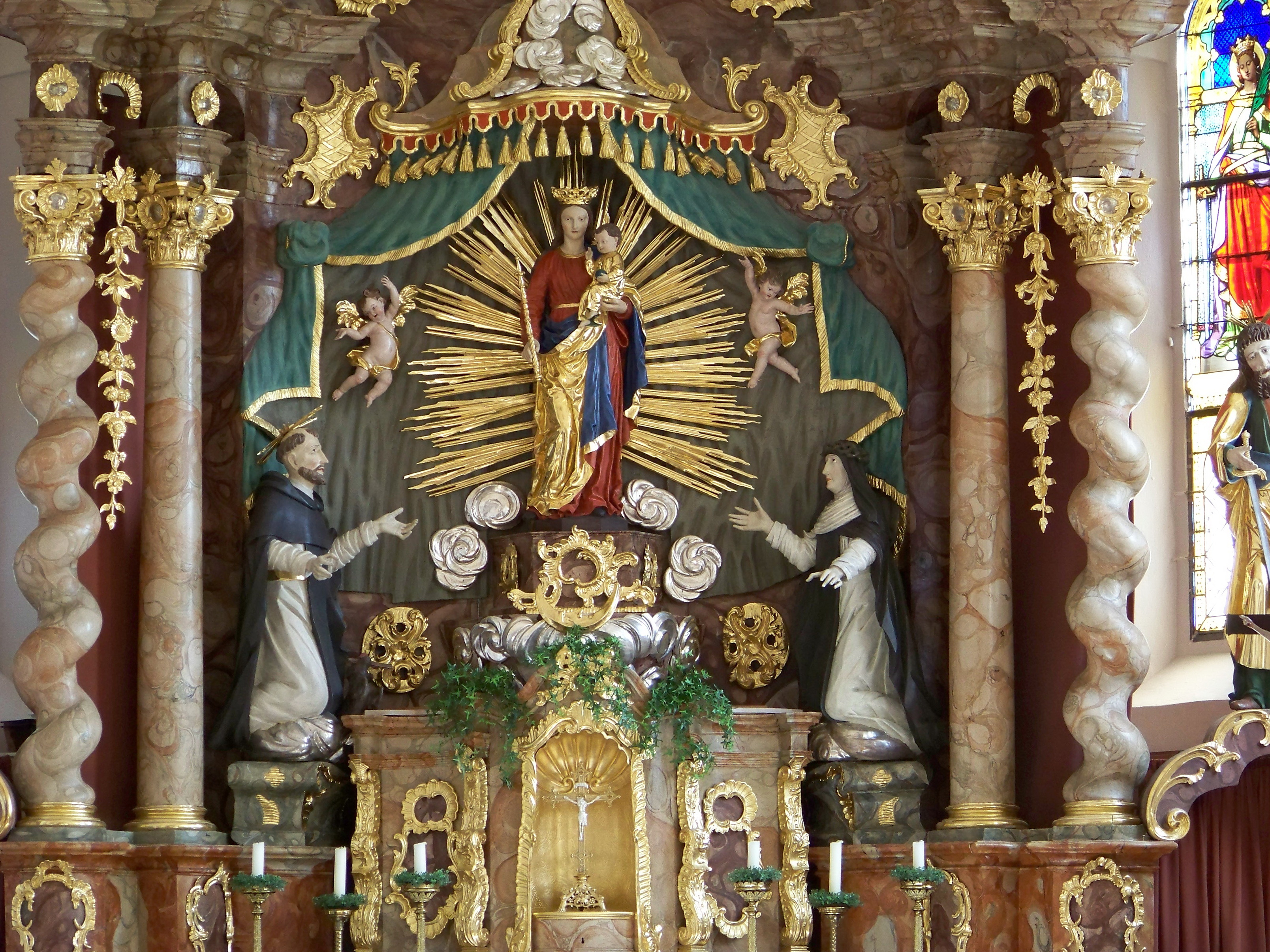 Hohenthann, Schmatzhausen. Kirche St. Katharina. Im Zentrum des Hochaltars Mutter Gottes mit Jesusknaben unter einem Baldachin, flankiert von Putten. Jesus hebt segnend die rechte Hand. Zu beiden Seiten Figuren des Dominikanerordens. Links St. Dominikus, rechts St. Katharina von Siena.